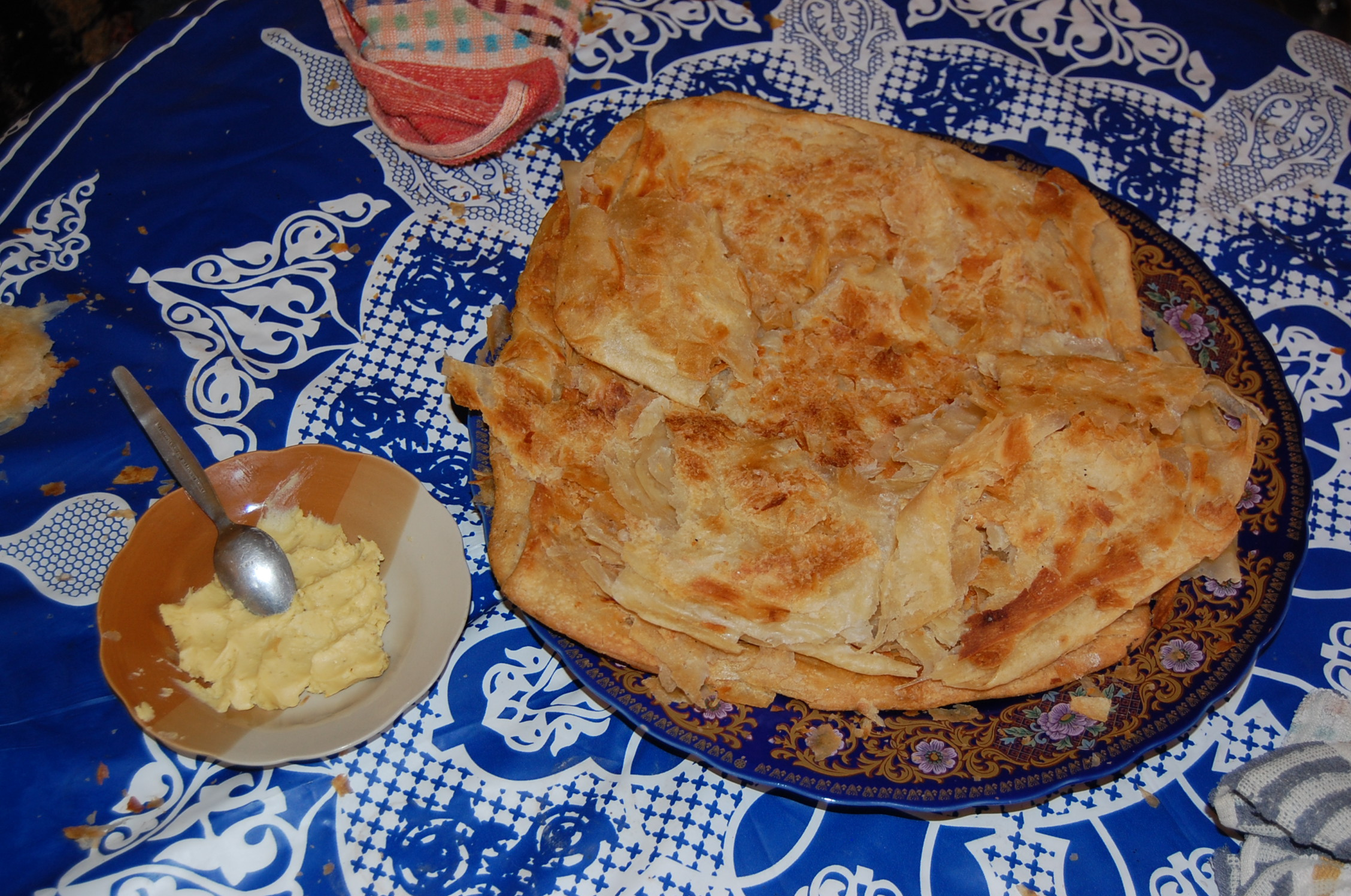 Walon: مسمّن (sôte di galete å boure), avou do سمن (seur boure) so l'assîte